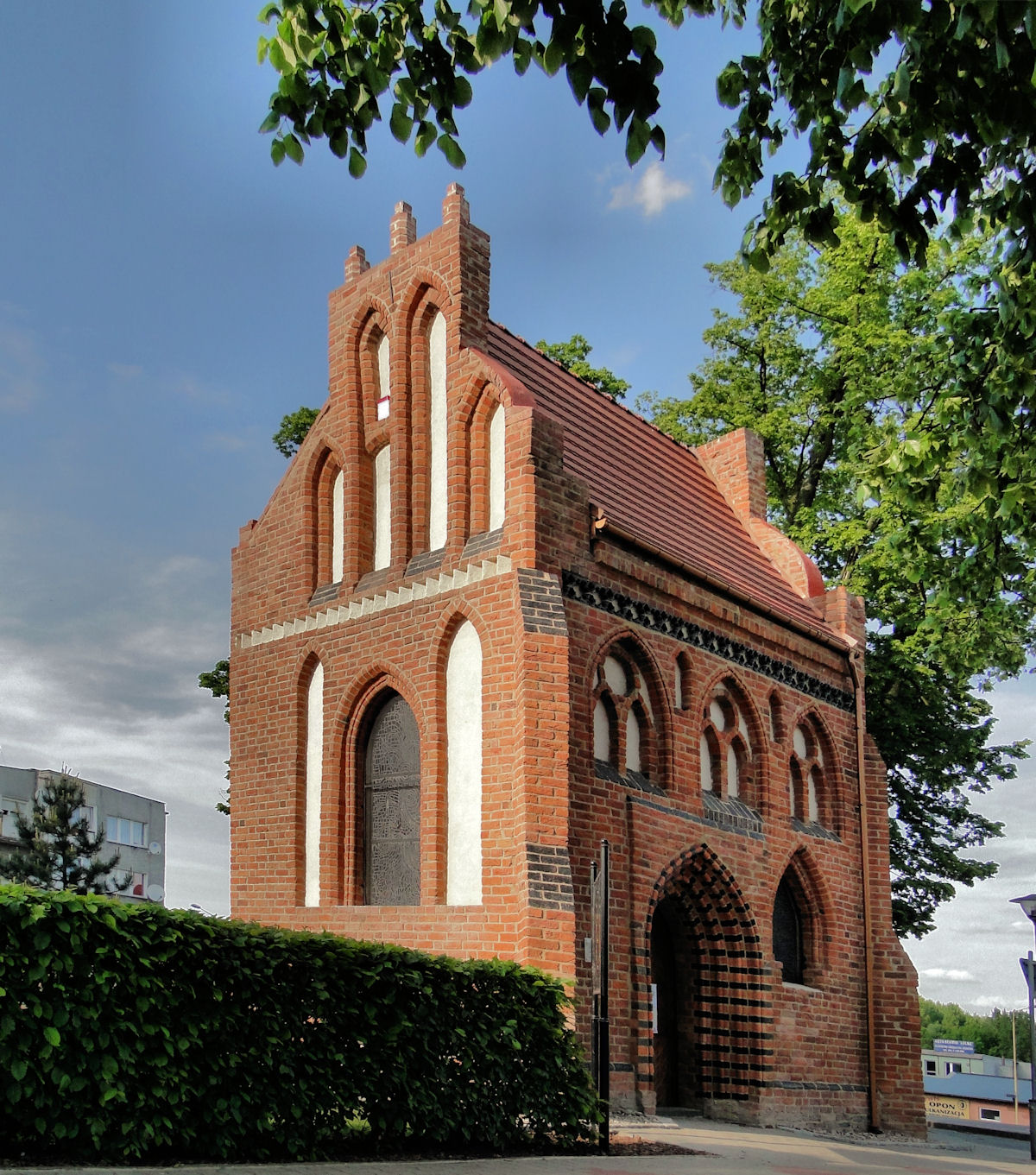 Kaplica gotycka w Policach